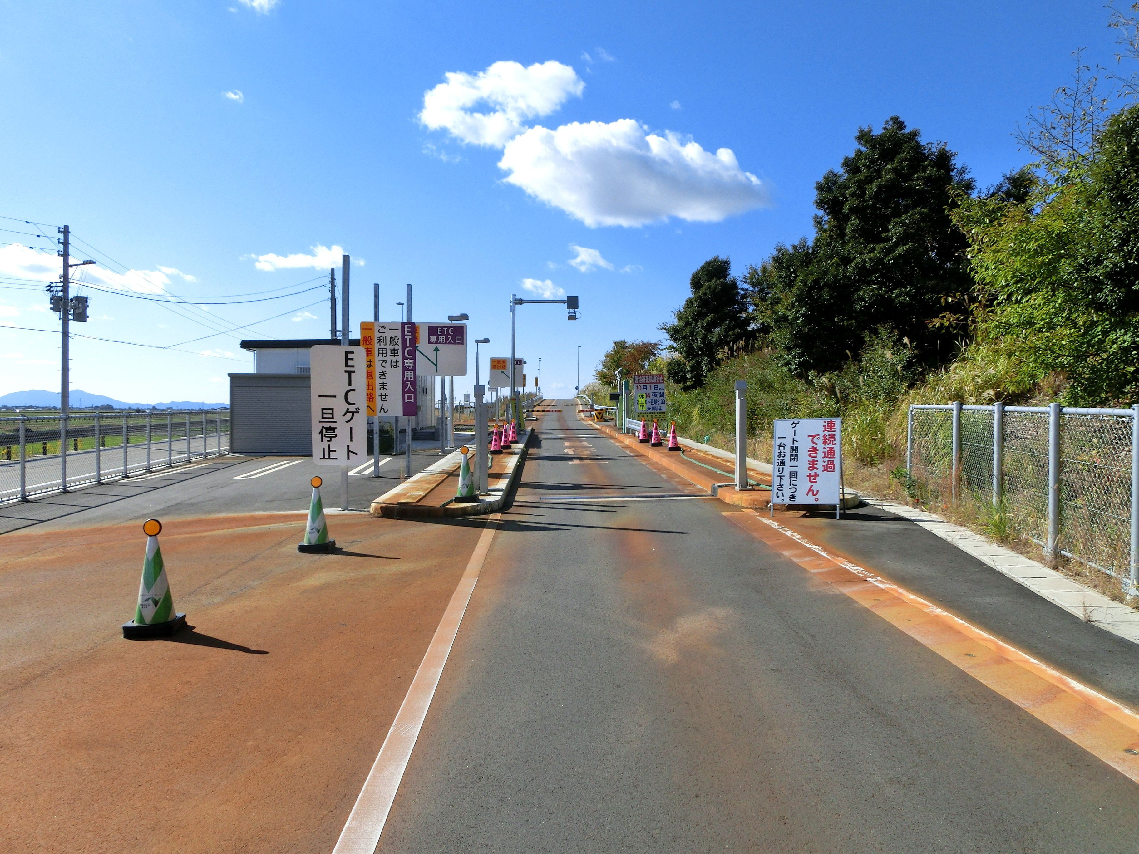 磐越自動車道 新津西スマートインターチェンジ